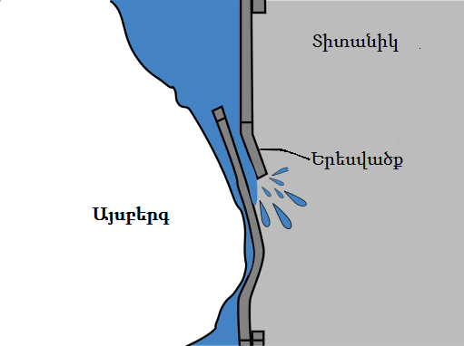 Տարածված կարծիքին հակառակ, այսբերգը չի ճեղքել«Տիտանիկ»-ի երեսվածքը: Ճնշման ազդեցությամբ ճաքել են գամերը, ծռվել են երեսվածքի պողպատե թերթերը, դրանց միջև առաջացել են բացվածքներ, որոնցով հատվածախոց սկսել է ջուր լցվել